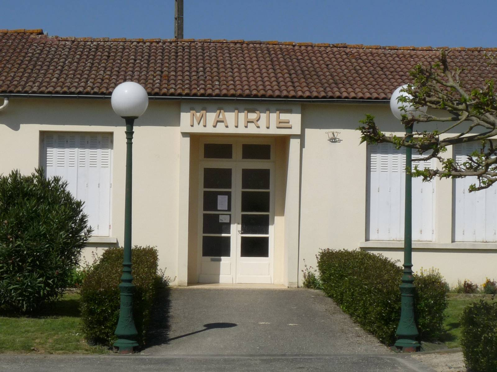 mairie de Fouqueure, Charente, France